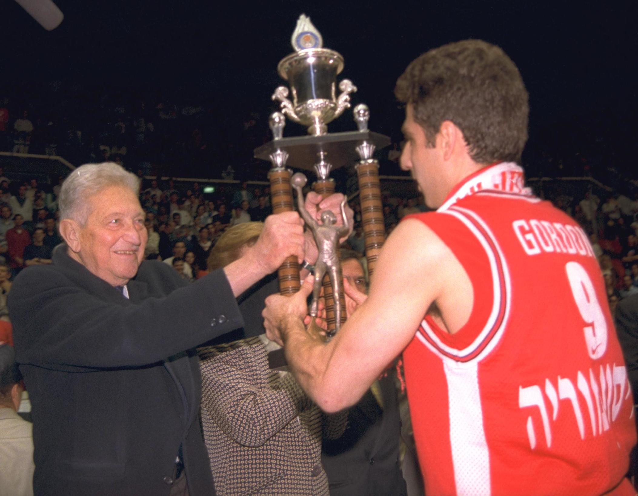 President Ezer Weizman presents the state basketball cup to Hapoel Jerusalem team captain Adi Gordon after his team's victory over Maccabi Tel Aviv in Yad Eliyahu Arena. . נשיא המדינה עזר ויצמן מעניק את גביע המדינה בכדורסל לקפטיין הפועל ירושלים, עדי גורדון, לאחר נצחון הפועל ירושלים על מכבי תל אביב, באולם הספורט ביד אליהו. Photo: YARON AVNER, 04/19/1996